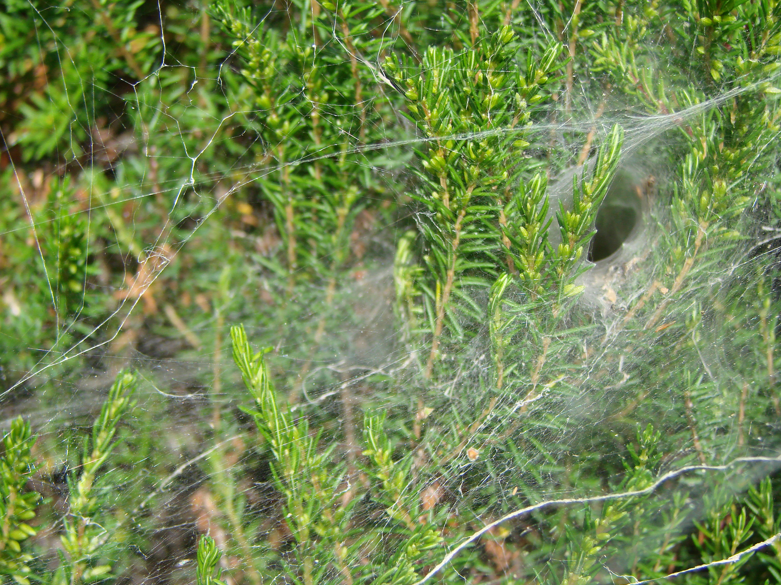 Toile d'araignée (agelenidae); on voit à droite le tunnel qui sert d'abri.Sud-Ouest de la France.